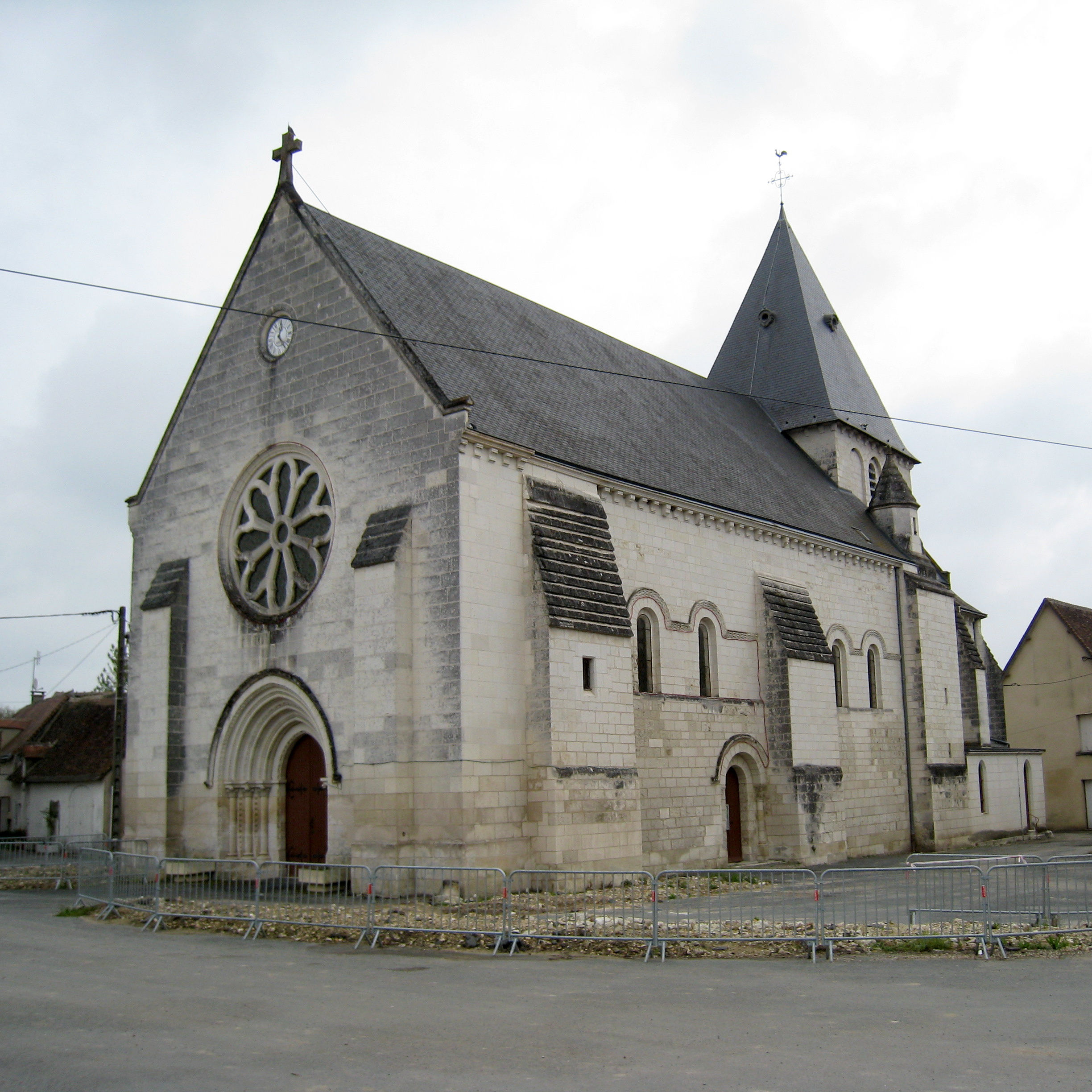 Eglise d'Azay le Ferron, Indre, France